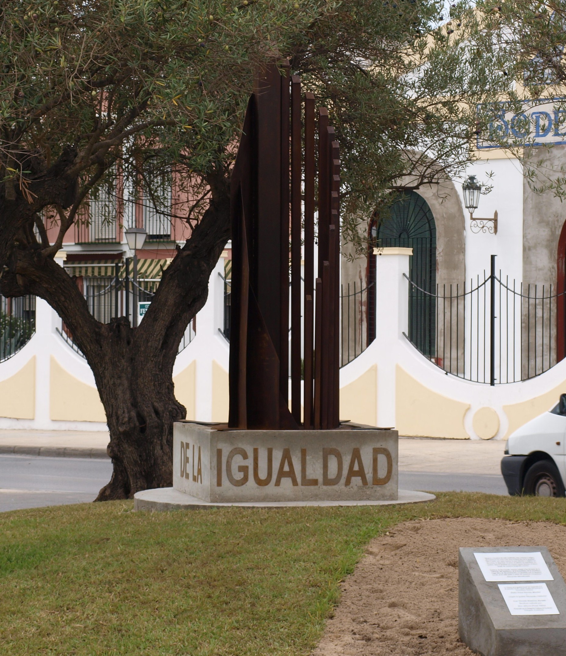 "Glorieta de la Igualdad Social" con monumento de Alberto Prats y manifiesto de Eduardo Mendicutti. Inaugurada el 23-9-2011.